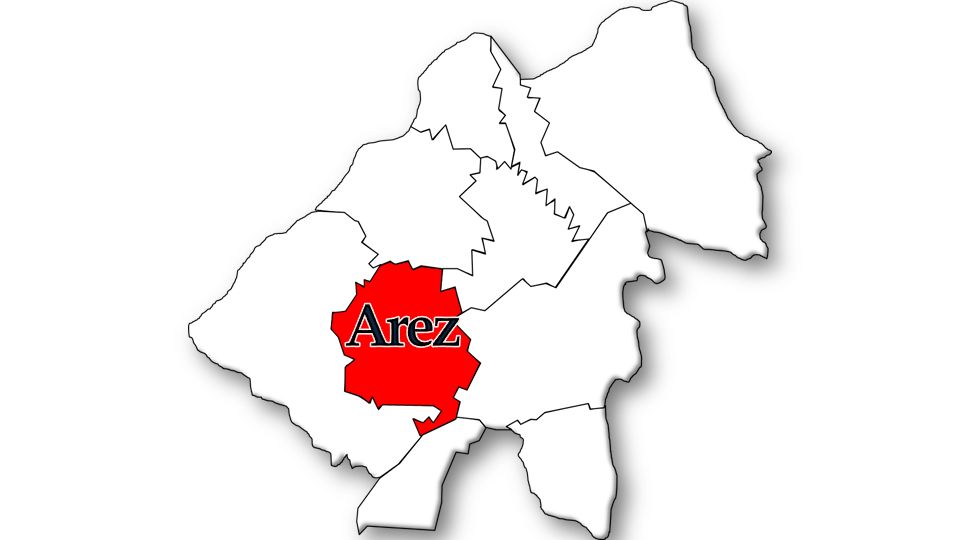 Evolução da População